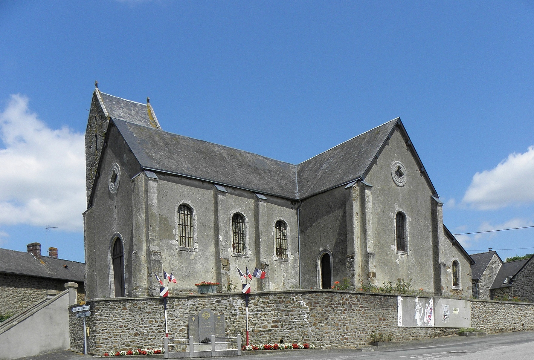 Église Saint-Pierre et Saint-Paul de Poulay, commune de Montreuil-Poulay (53).